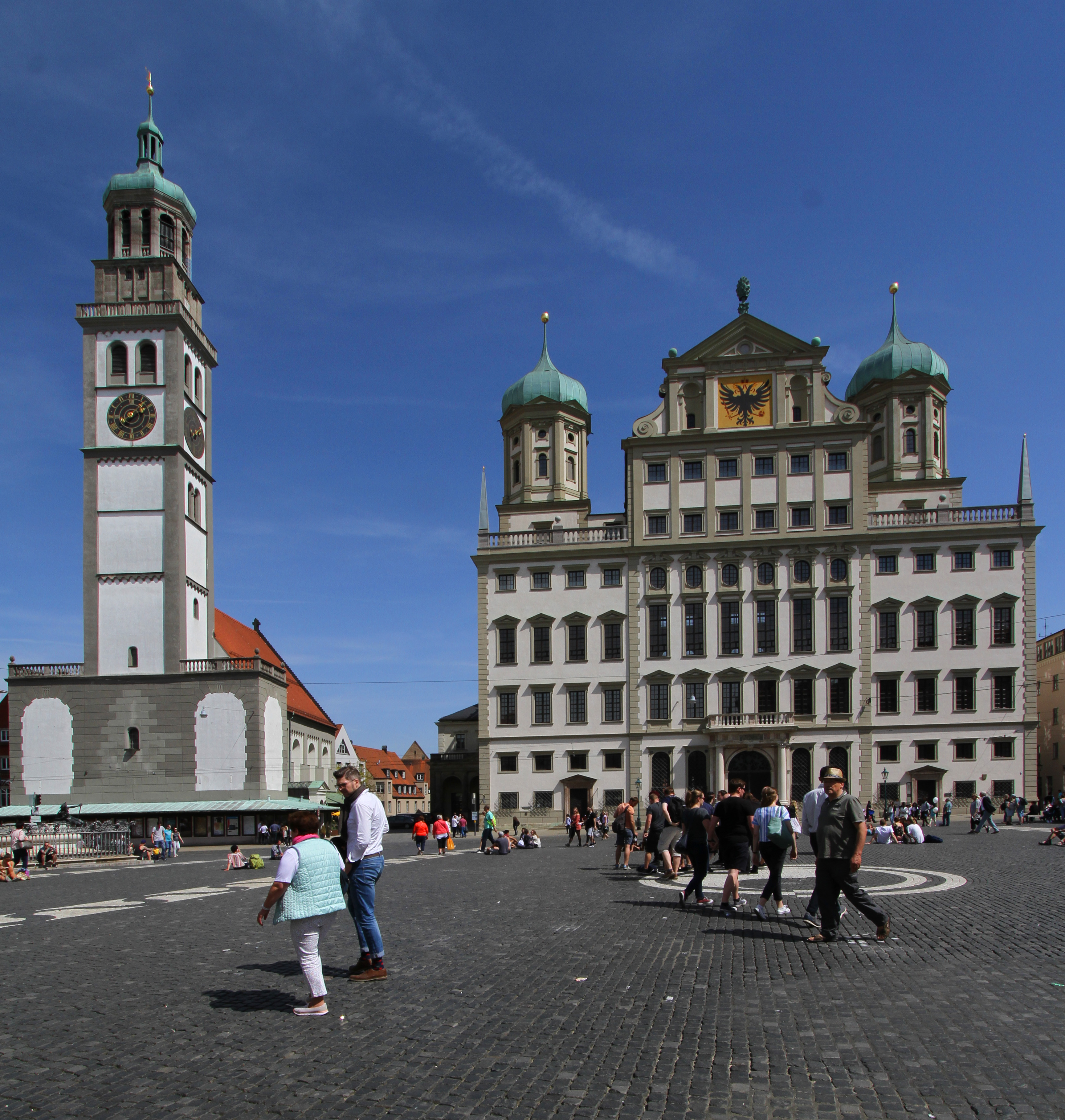 Perlachturm und Rathaus in Augsburg